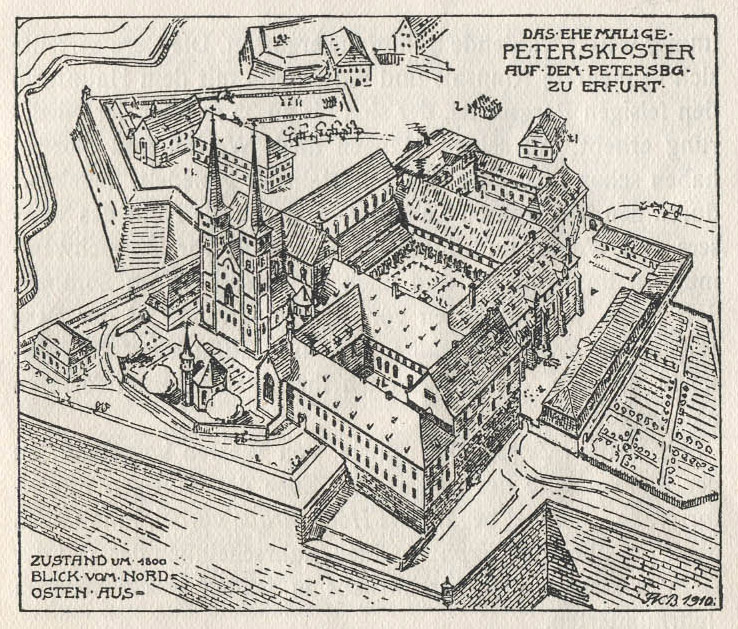 ehem. Benediktinerkloster St. Peter und Paul (Peterskloster) um 1800, Ansicht aus Nordosten